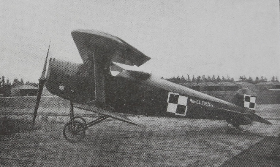 Hanoveraner-Roland CL.V - samolot bojowy produkcji niemieckiej